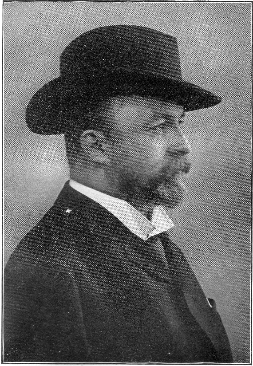 Fotografie